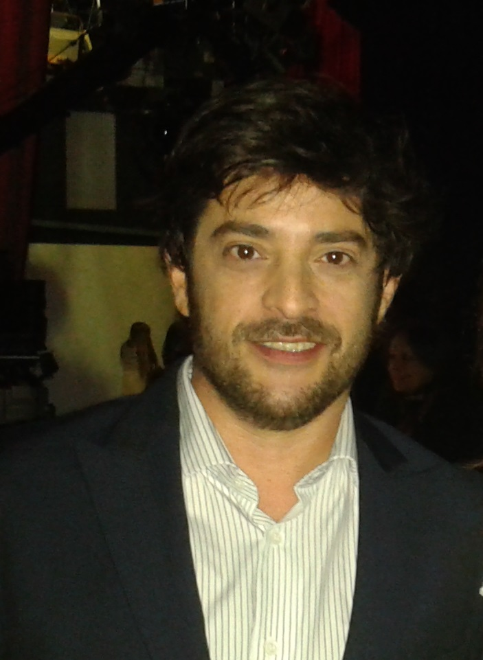 Pablo Rago, actor argentino